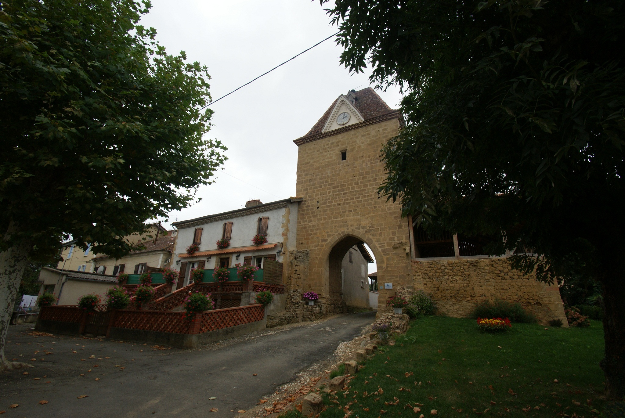 Toren en poort van oude stadsmuur.